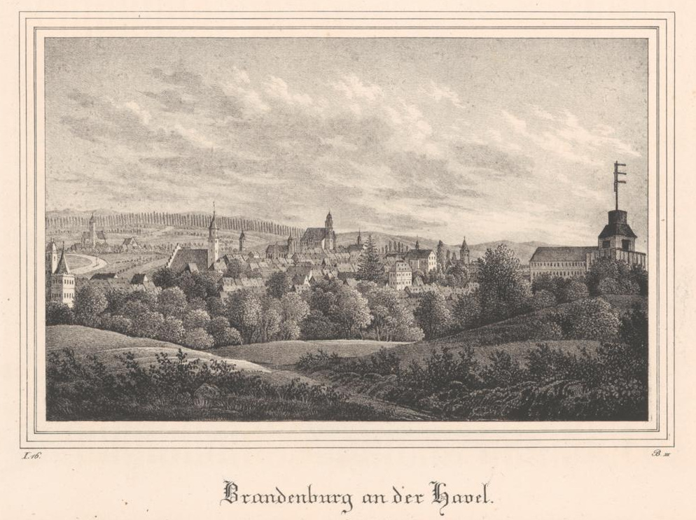 Brandenburg an der Havel, Lithographie : 18 x 12 cm, Heinrich Wilhelm Teichgräber